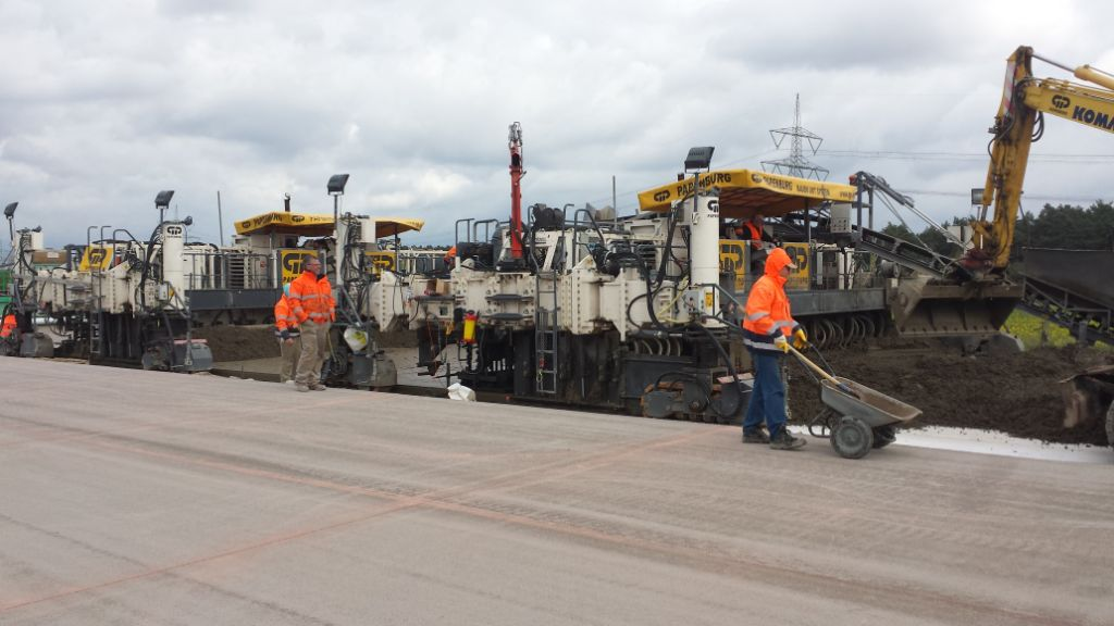 Einbau der Betonfahrbahn der A 14-Nordverlängerung bei Colbitz im April 2014.